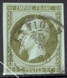 France stamp, Napoleon III Empire, 1 centime vert